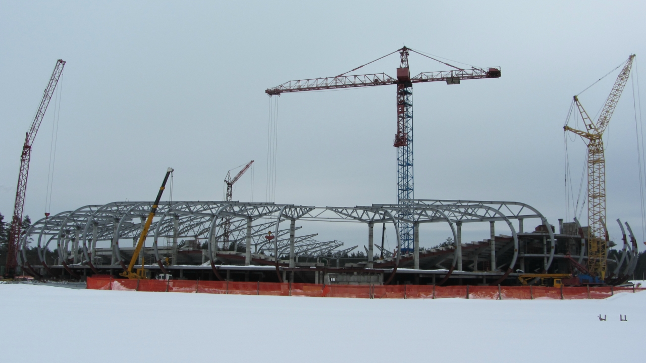 Строительство стадиона БАТЭ в Борисове, март 2013 года